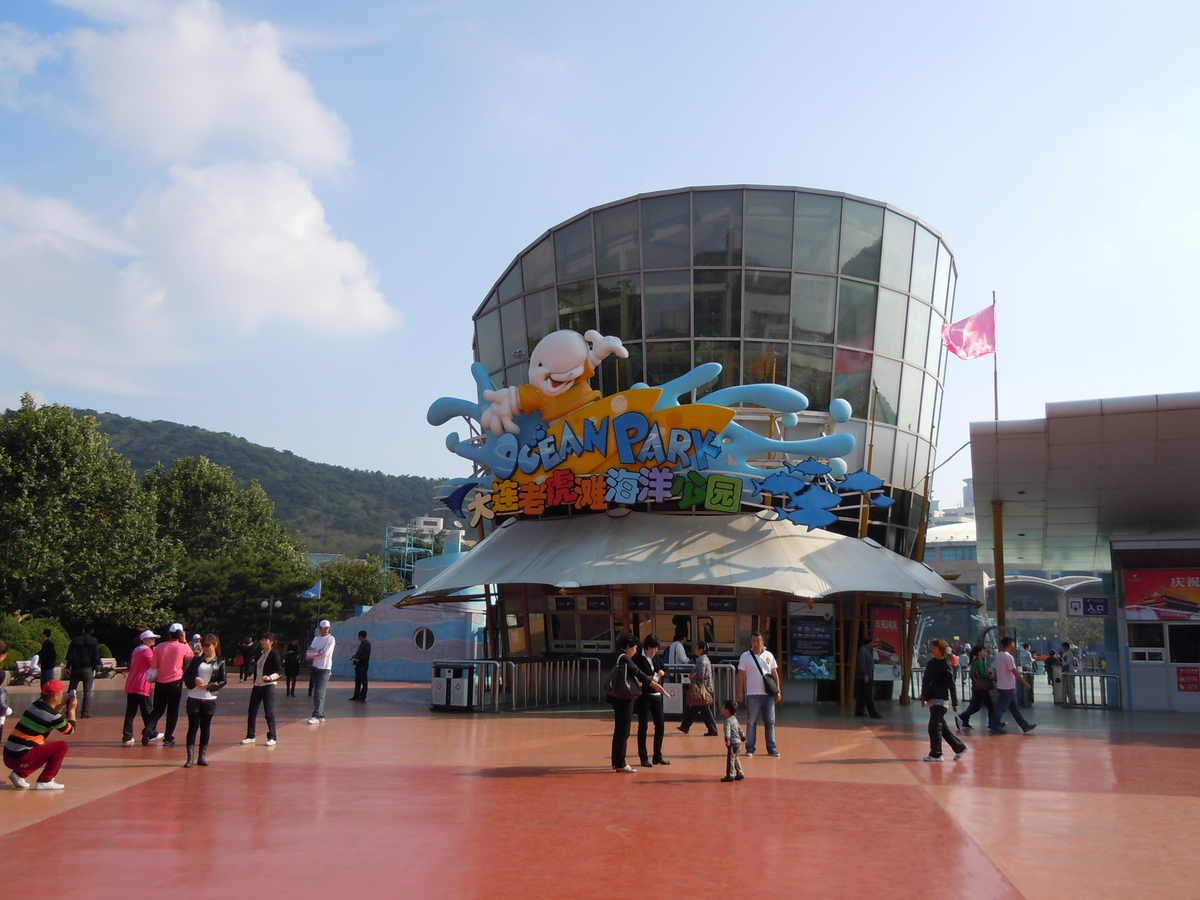 大连老虎滩海洋公园